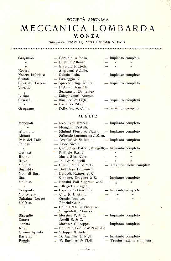 Società Anonima Meccanica Lombarda - Elenco dei molini eseguiti in Italia e all'estero pag. 205